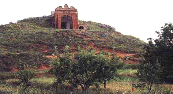 portada del Santo Sepulcro en Ibdes